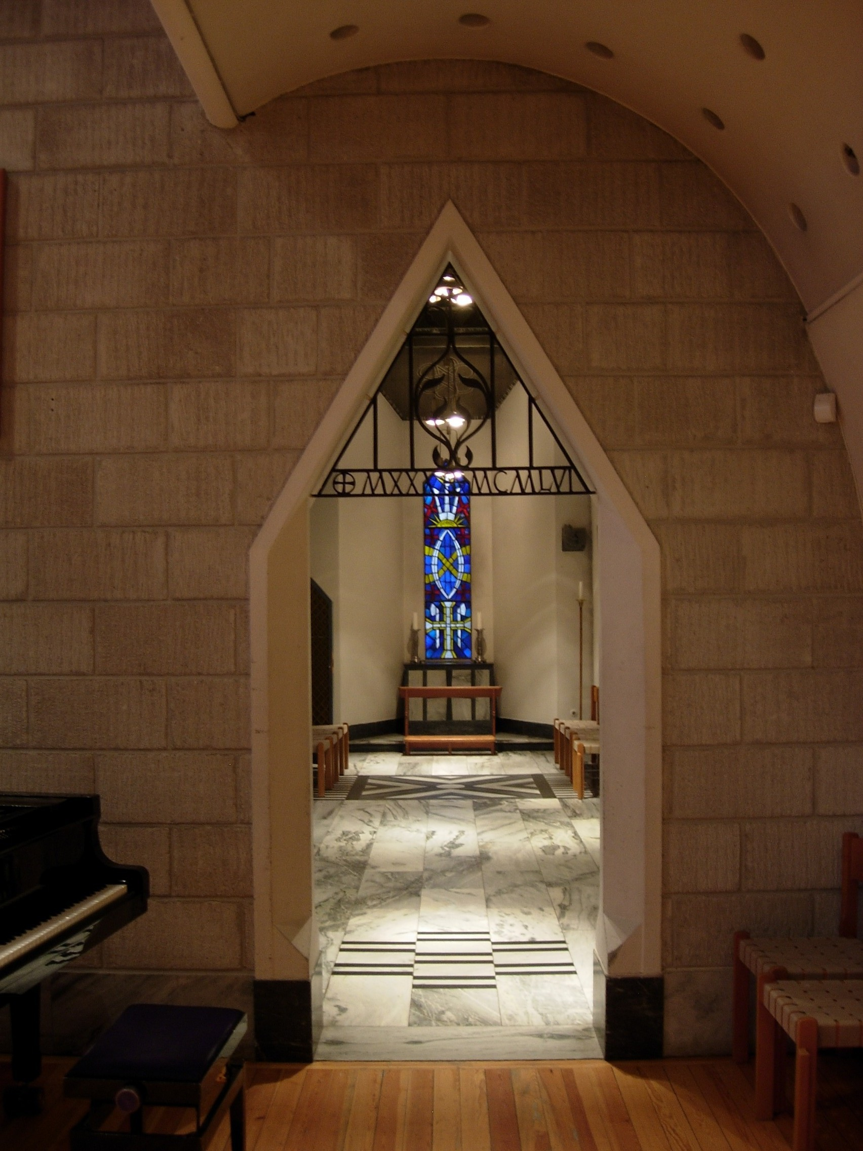 Portal i Bodø domkirke